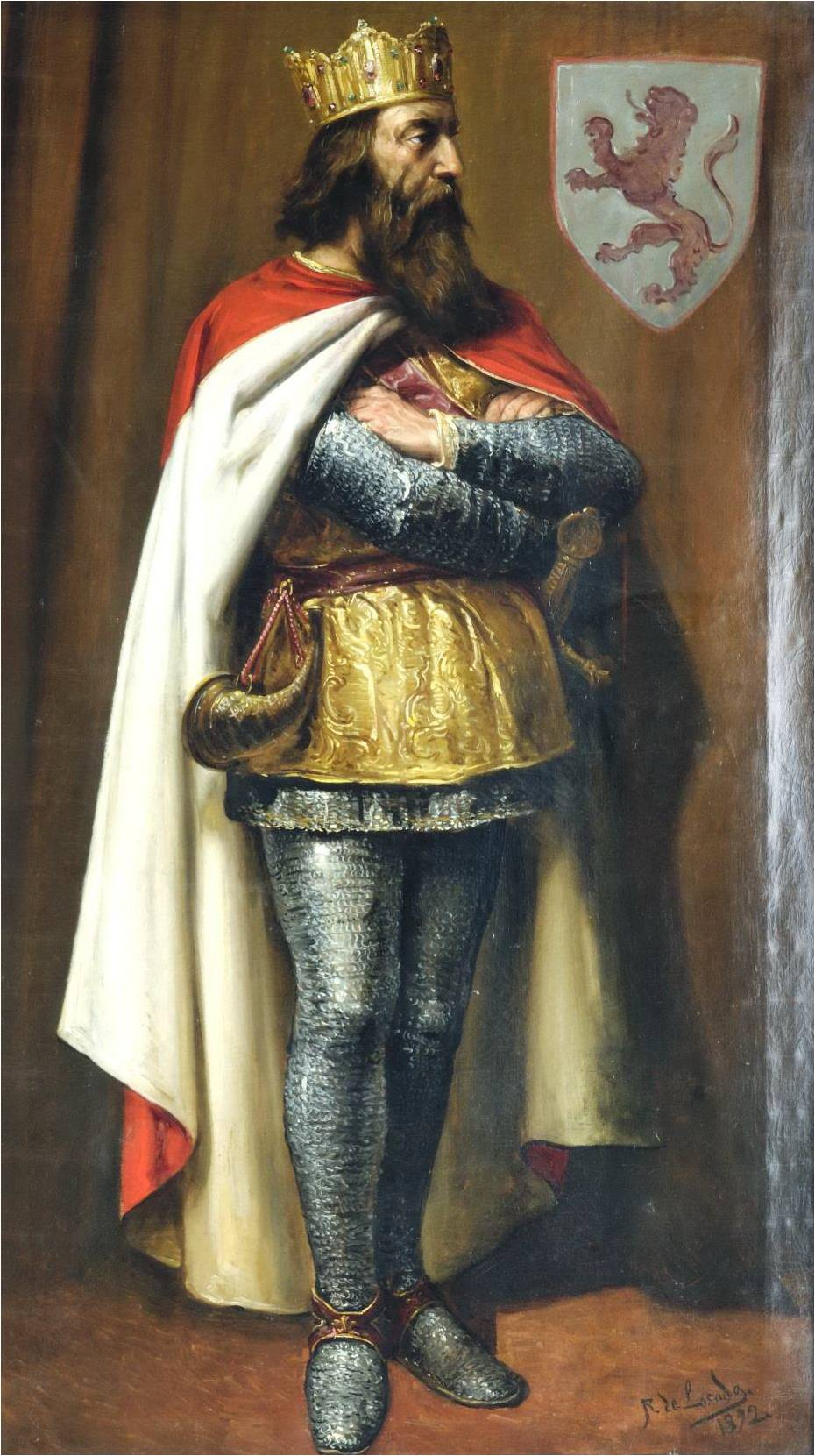 Retrato imaginario del rey Alfonso V de León (↑ 1028). Fue hijo del rey Bermudo II de León y de la reina Elvira García. Reconstruyó la ciudad de León que había sido muy dañada por los ataques de Almanzor, y en 1017, en una reunión de la curia regia, se promulgó el Fuero de León, que ha sido calificado como la sanción jurídica del feudalismo leonés. Falleció en el año 1028 y fue sucedido por su hijo, Bermudo III de León.